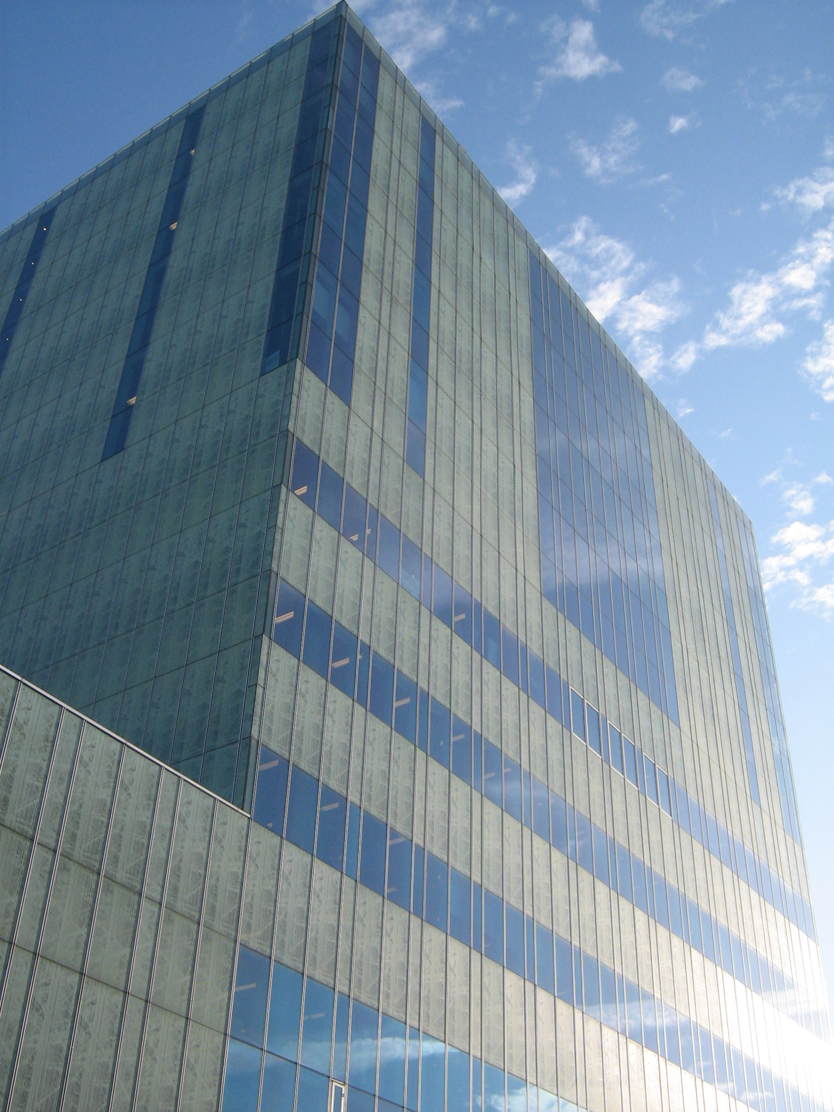 TU/e: Casa Vertigo, faculteit bouwkunde